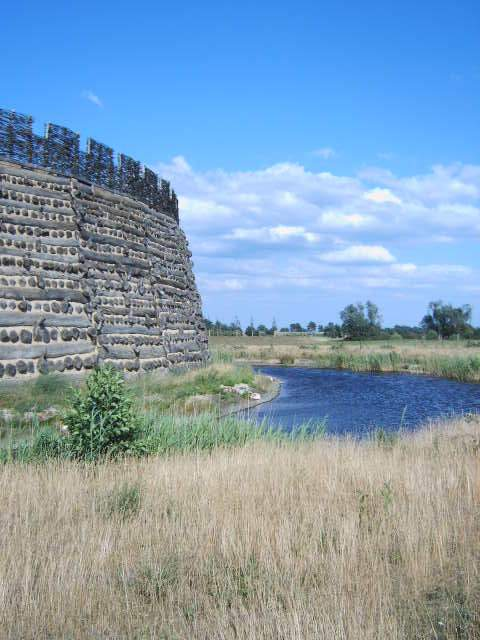 Slawenburg Raddusch, Land Brandenburg, Deutschland Bild aufgenommen am 26.6.2006 durch Olaf Meister